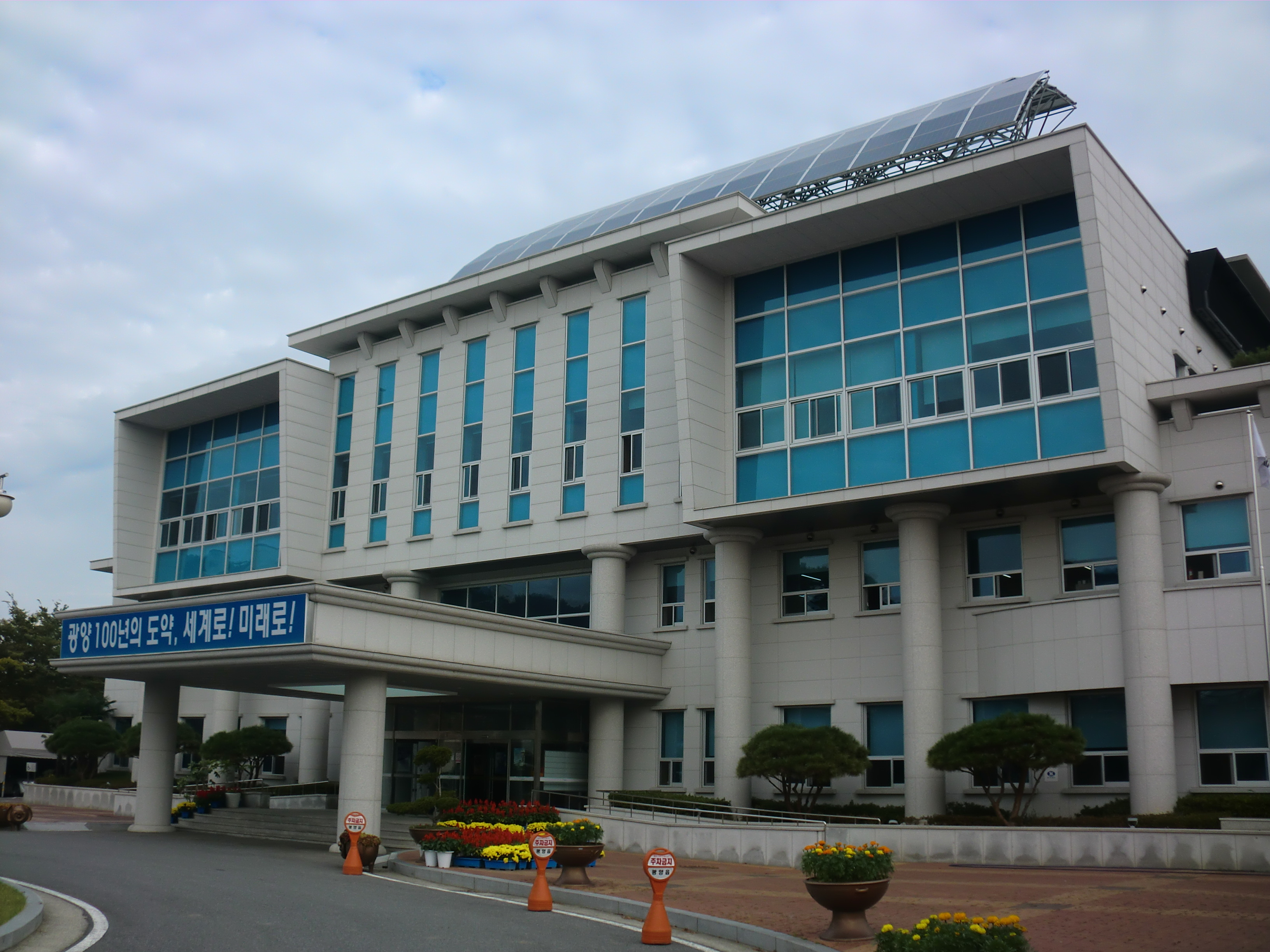 전라남도 광양시 광양읍에 있는 광양읍사무소